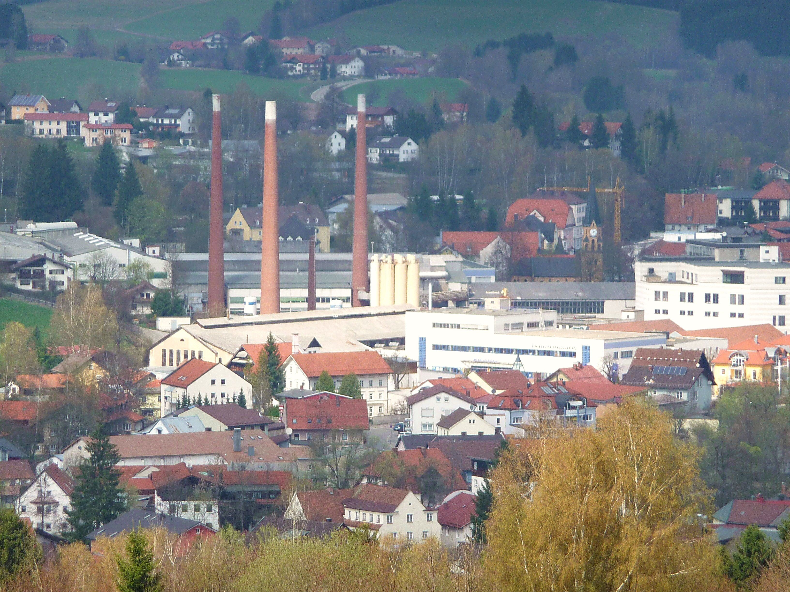 Die Glasfabrik Zwiesel vom Einsiedeleifelsen bei Bärnzell aus